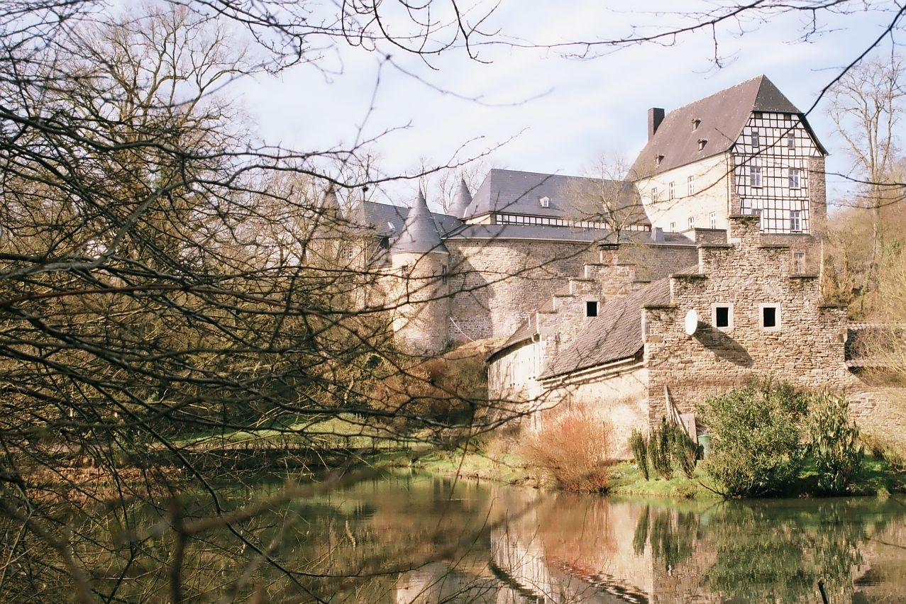 Burg Herrnstein in Ruppichteroth, von Osten gesehen